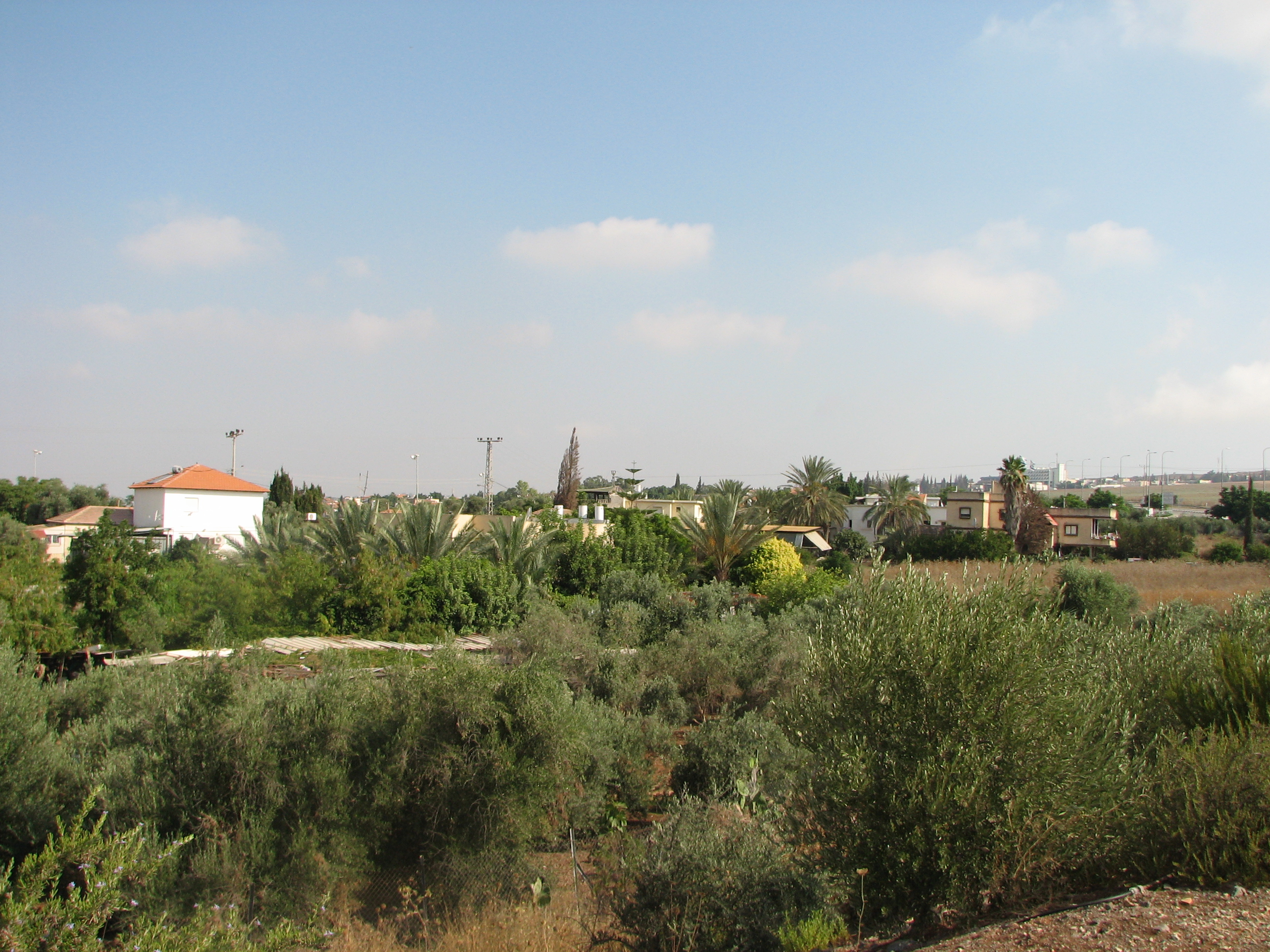 Poriya - Neve Oved is a communal settlement in northern Israel Located to the south of the Sea of Galilee, Israel פוריה-נווה עובד הינו יישוב קהילתי באזור הצפון ליד העיר טבריה, על רכס פוריה ושייך למועצה אזורית עמק הירדן